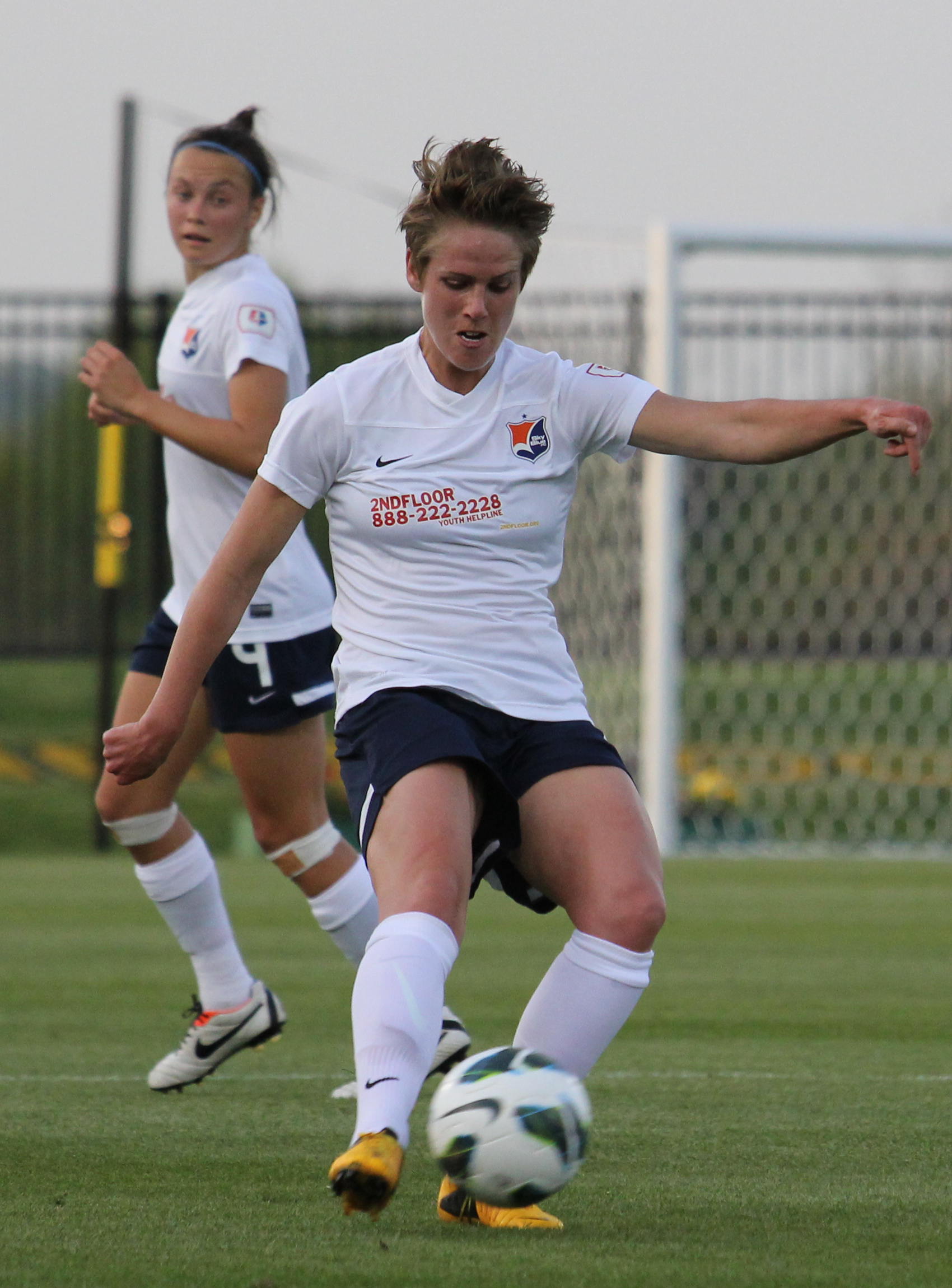 2013-04-27 Spirit - Sky Blue-43